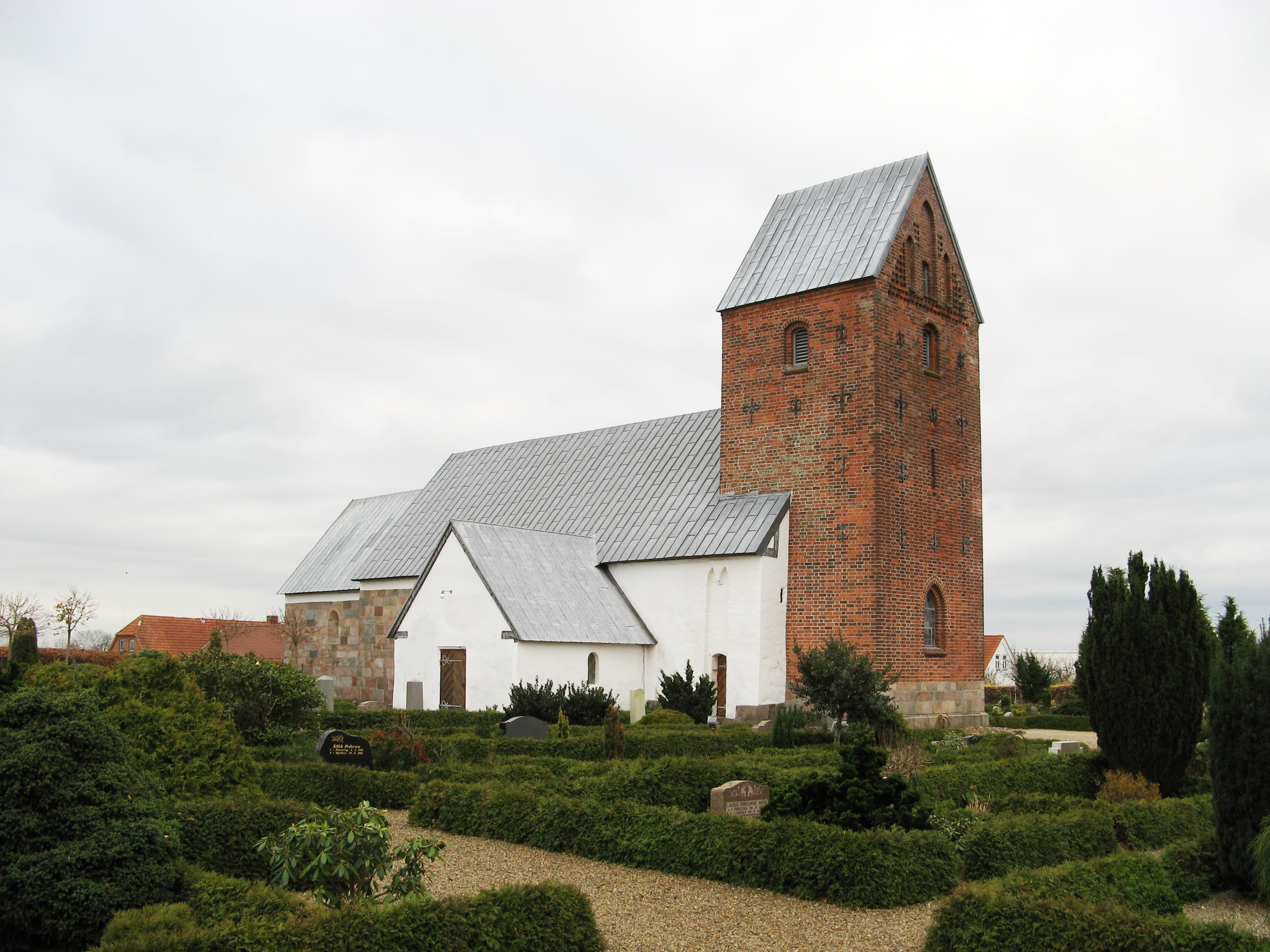 Grimstrup kirke, Grimstrup sogn, Varde kommune (former: Skads Herred, Ribe Amt). Grimstrup kirke set fra nordvest